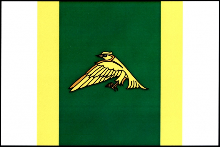 vlajka, , okres Ústí nad Orlicí